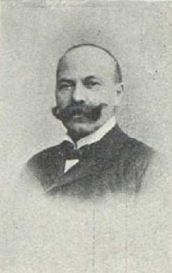 Josef Žďárský (1853-1939), československý politik